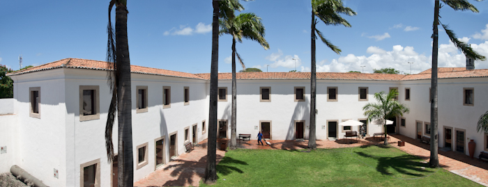 Museu da Cidade do Recife - Forte de São Tiago das Cinco Pontas — Recife, Pernambuco, Brasil